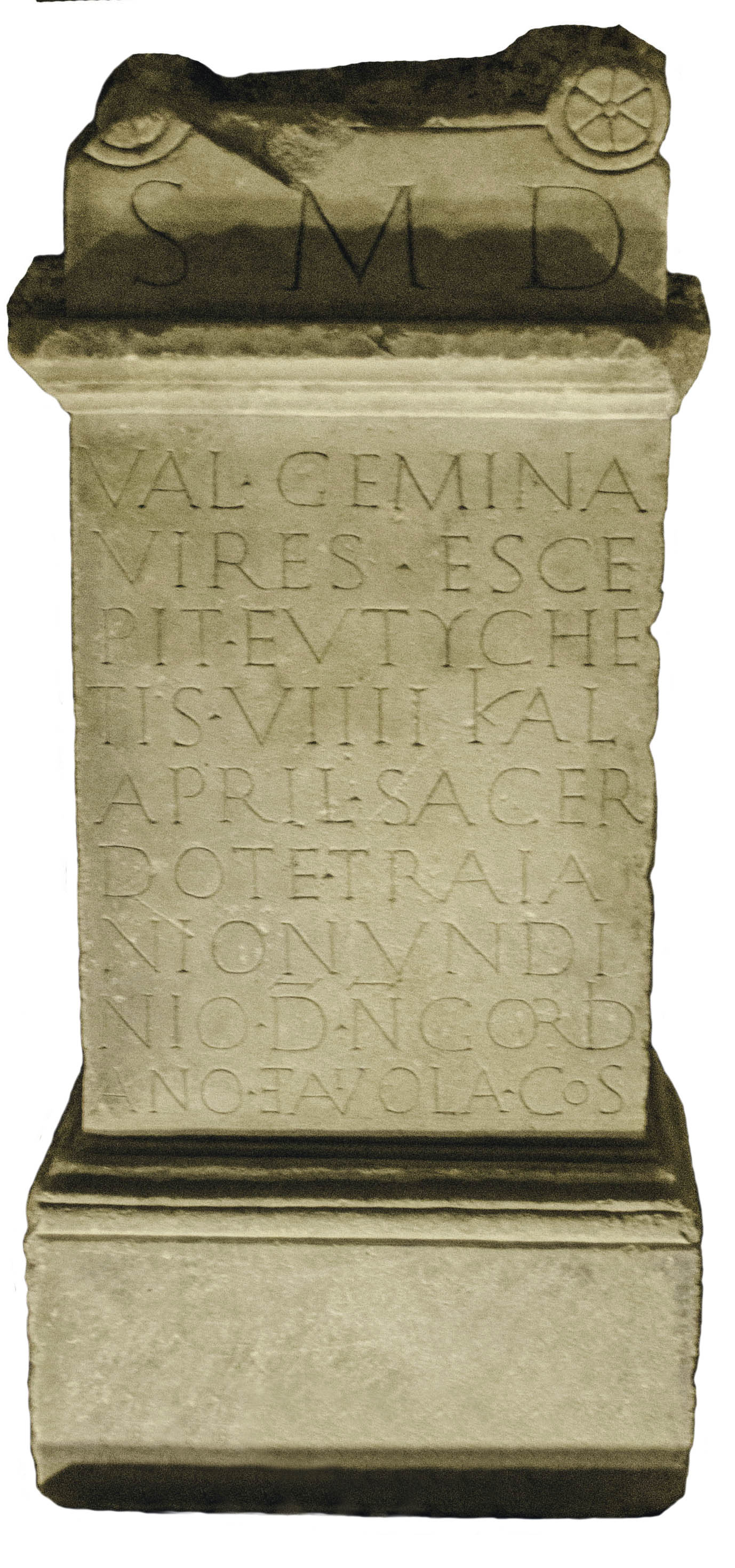 Autel de Valeria Gemina, 239 ap. JC. Musée Eugène-Camoreyt, Lectoure, Gers, France.